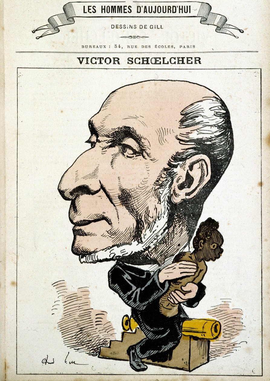 Victor Schœlcher caricaturé par André Gill, Les Hommes d'aujourd'hui, n° 49.